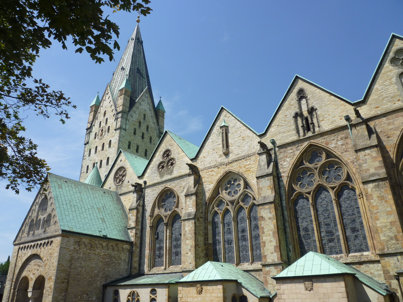 Der Dom zu Paderborn am Domplatz 1 - Südfassade. This is a photograph of an architectural monument.